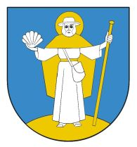 Herb wsi i gminy Pałecznica.